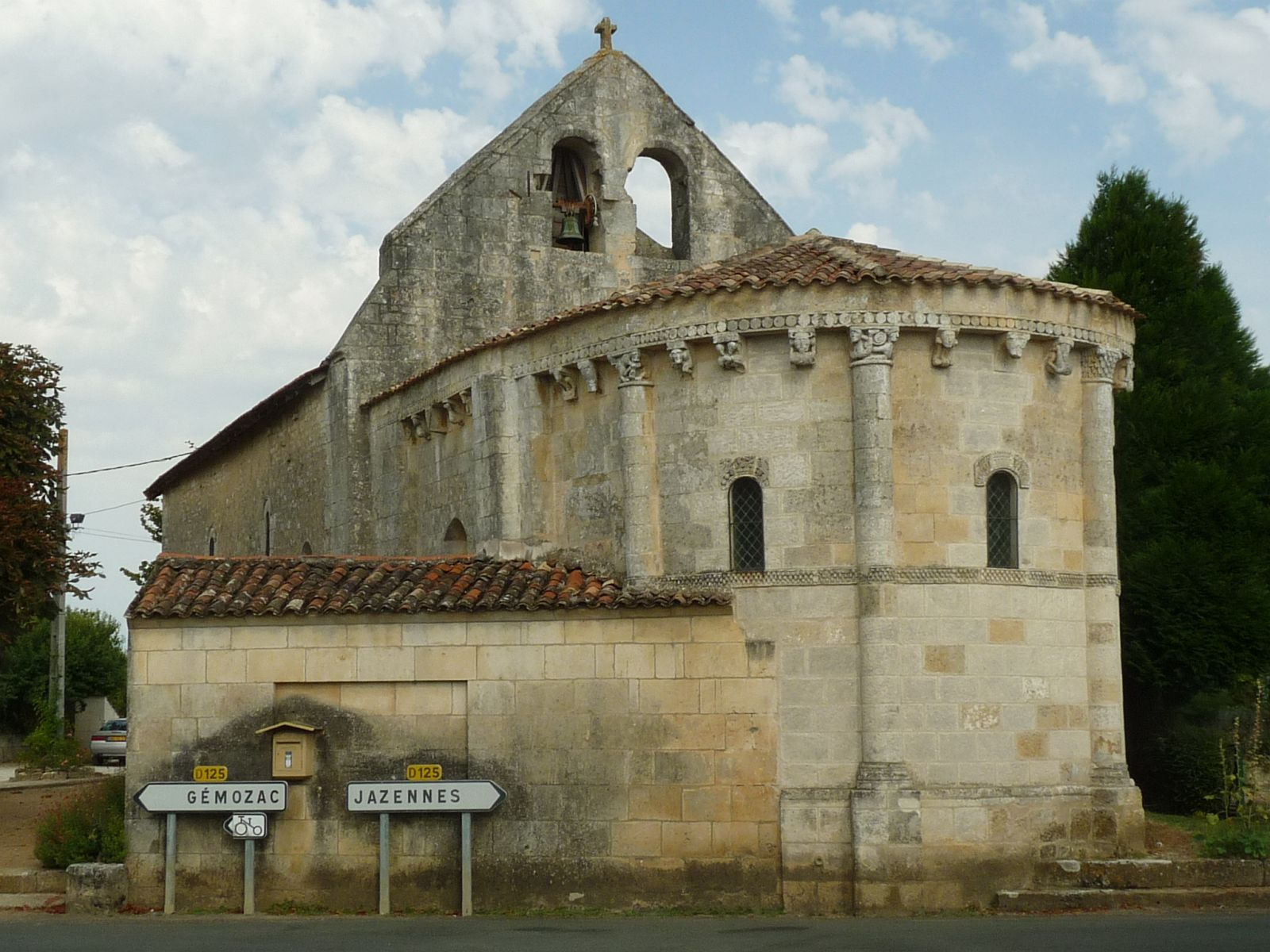 église de Givrezac